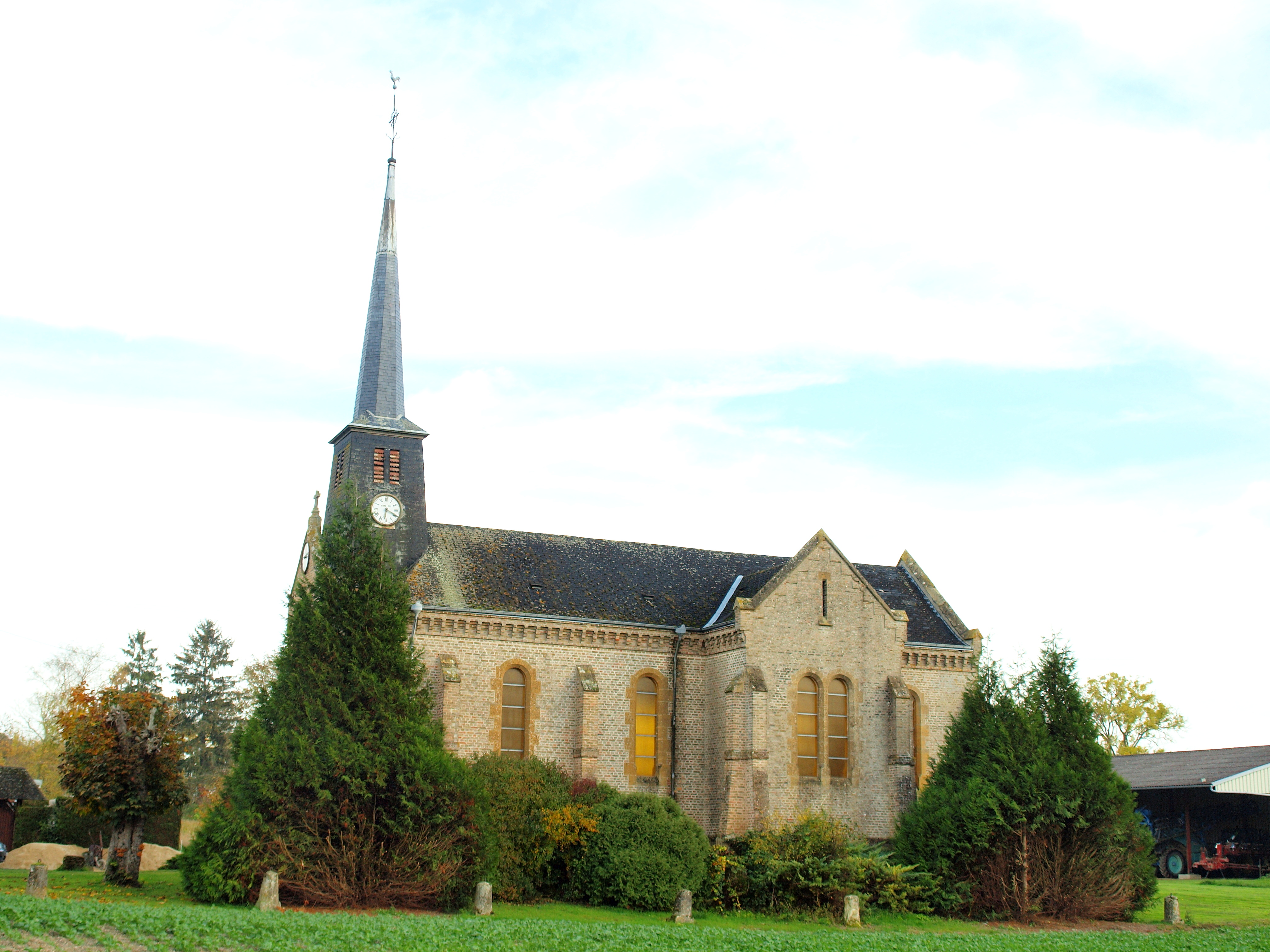 Mont-Saint-Remy (Ardennes, France)